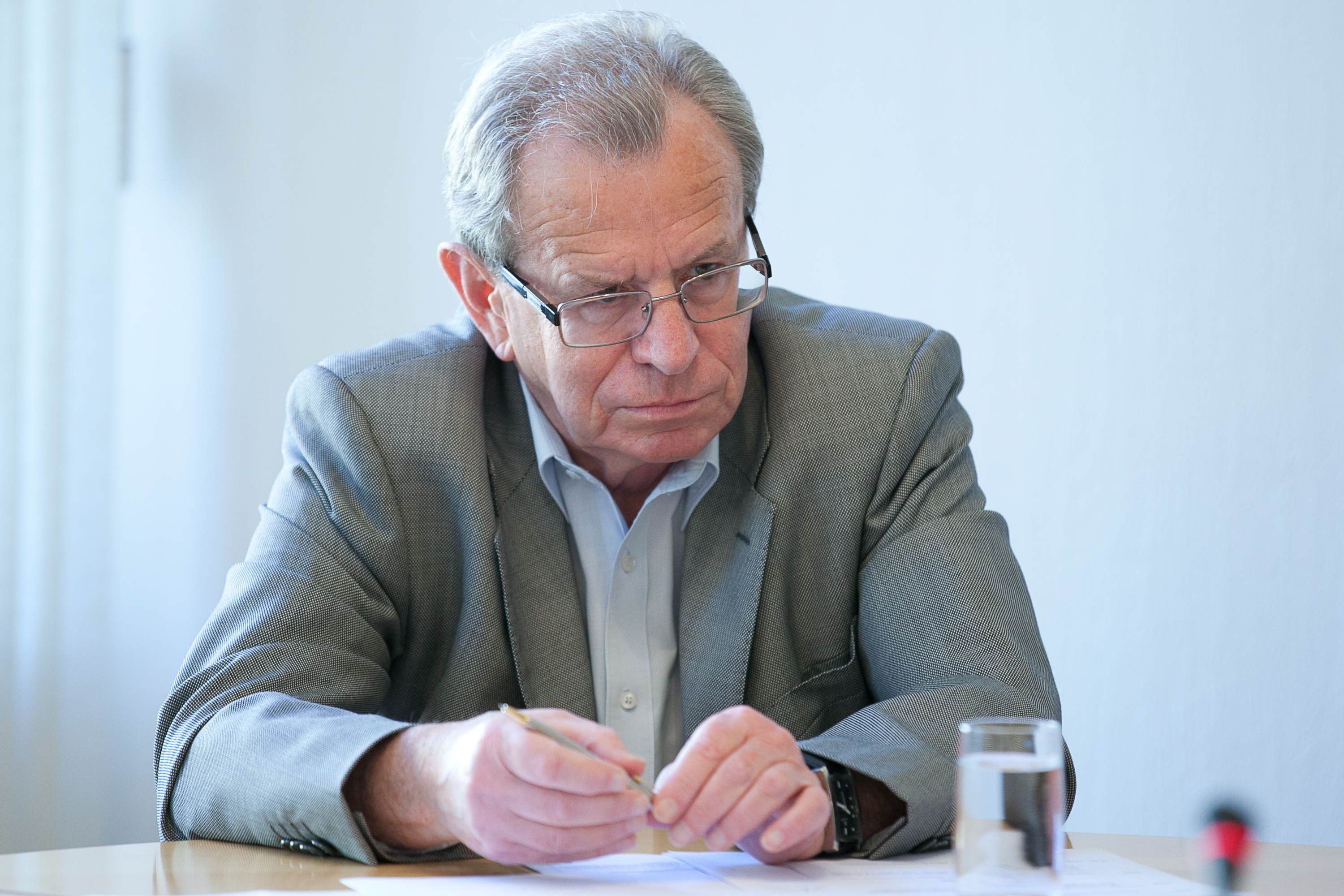 2012.gada 20.jūnijs. Valsts pārvaldes un pašvaldības komisijas sēde. Foto: Ernests Dinka, Saeimas Kanceleja